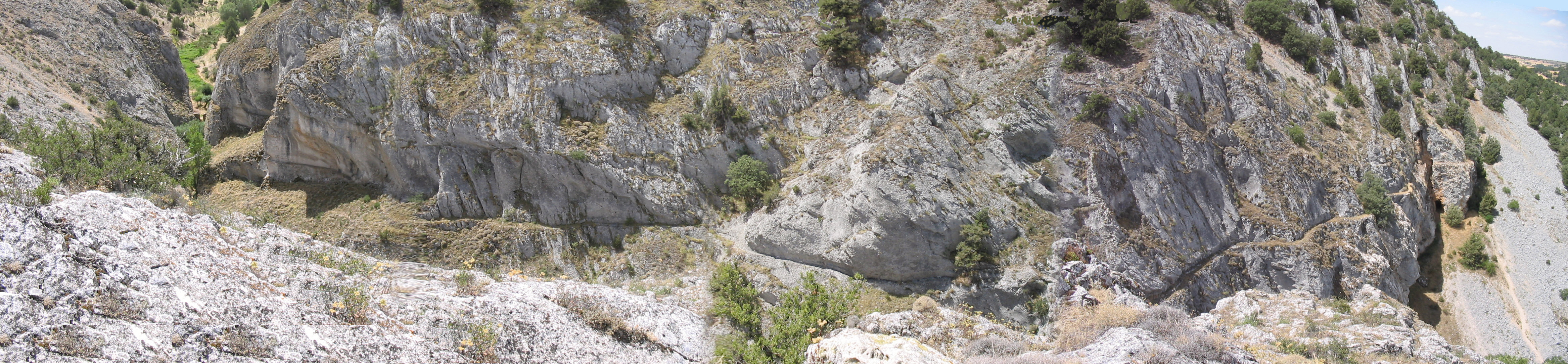 Panorámica de la "senda" desde "Los Castros". (Fotomontaje).